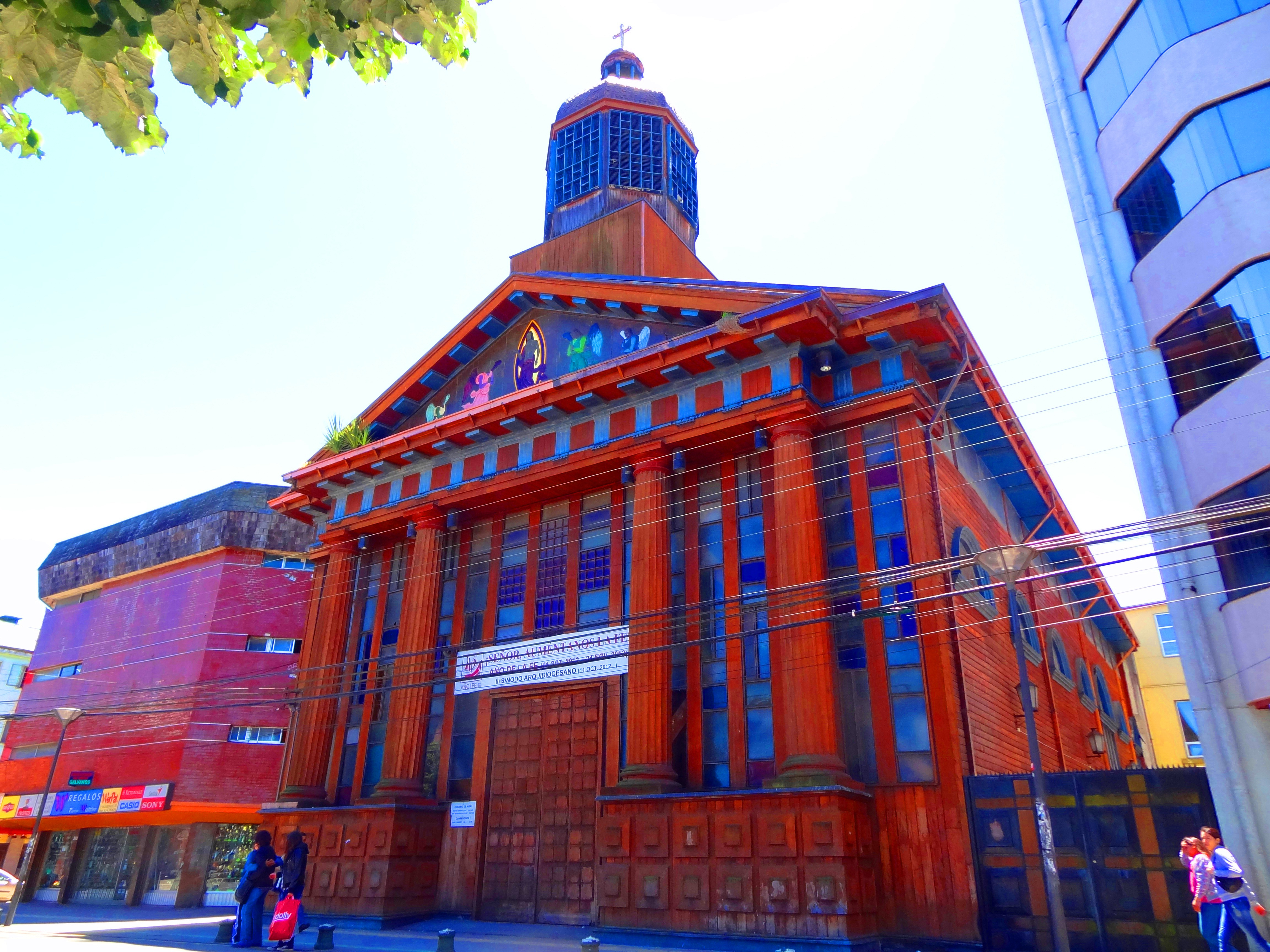 Iglesia Catedral de la ciudad de Puerto Montt, es un antiguo edificio completamente de madera construido en gran parte por los primeros colonos católicos alemanes. Fue usado por el ejercito de Chile como establo para caballos.